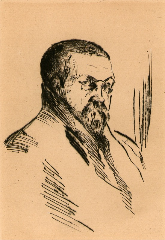 Portrett av Tryggve Andersen.